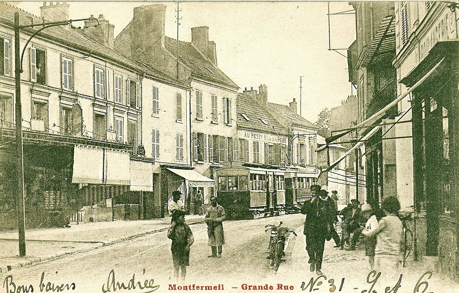 carte postale ancienne éditée par BrégerMONTFERMEIL - Grande rue (Bon plan du tramway 112 de la STCRP)